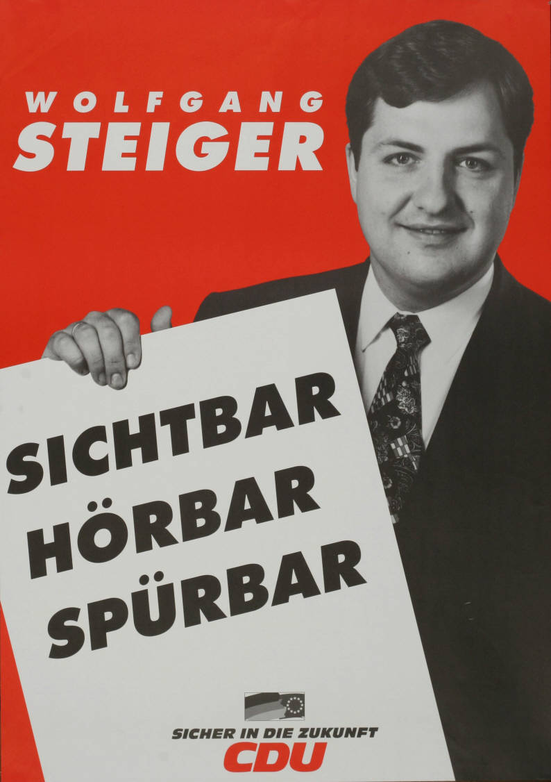 Wolfgang Steiger Sichtbar Hörbar Spürbar Sicher in die Zukunft CDUAbbildung:FotoPlakatart:Kandidaten-/Personenplakat mit PorträtObjekt-Signatur:10-001: 4032Bestand:Plakate zu Bundestagswahlen (10-001)GliederungBestand10-18:Plakate zu Bundestagswahlen (10-001) » Die 13. Bundestagswahl am 16. Oktober 1994 » CDU » Mit PorträtfotoLizenz:KAS/ACDP 10-001: 4032 CC-BY-SA 3.0 DE